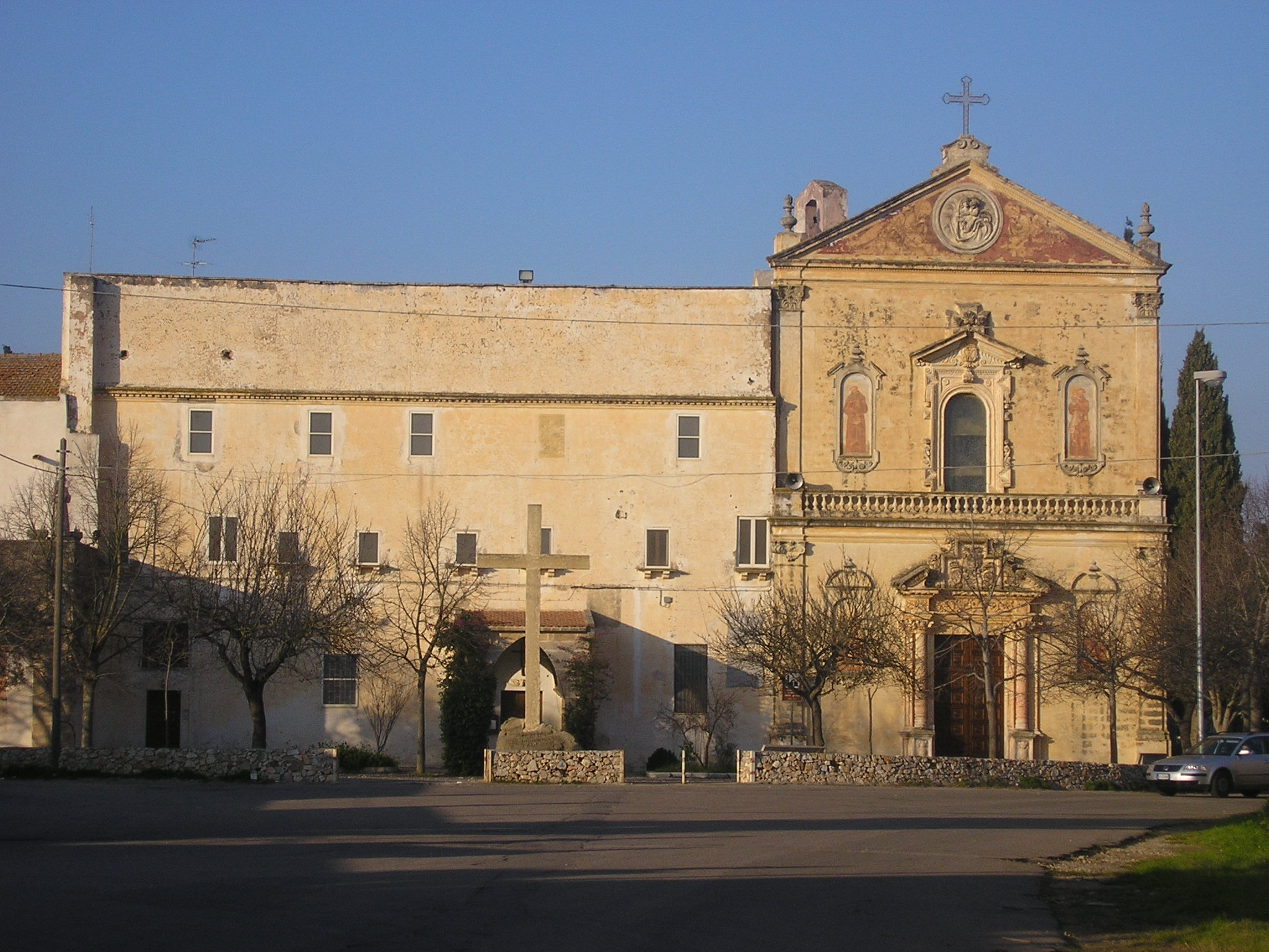 Galatone, provincia di Lecce: Convento e chiesa della Madonna della Grazia.